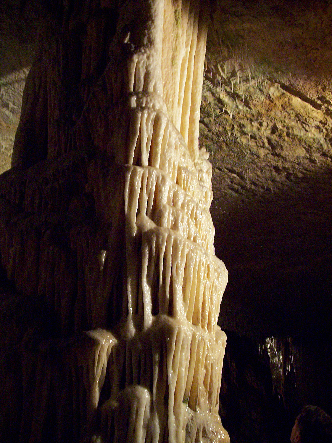 From cave of "Postojnska Jama" in Slovenia